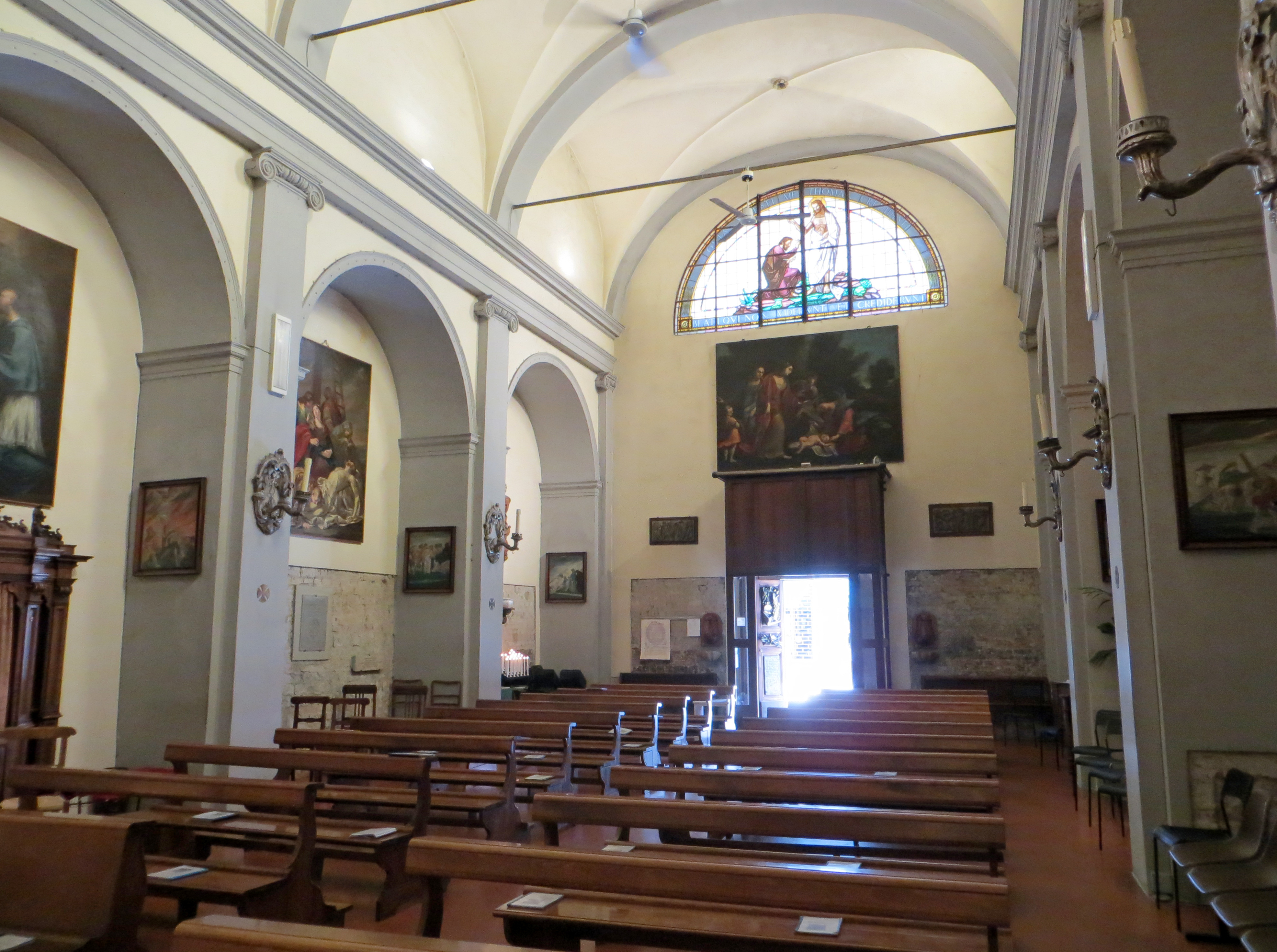 Chiesa di San Tommaso (Parma) - navata